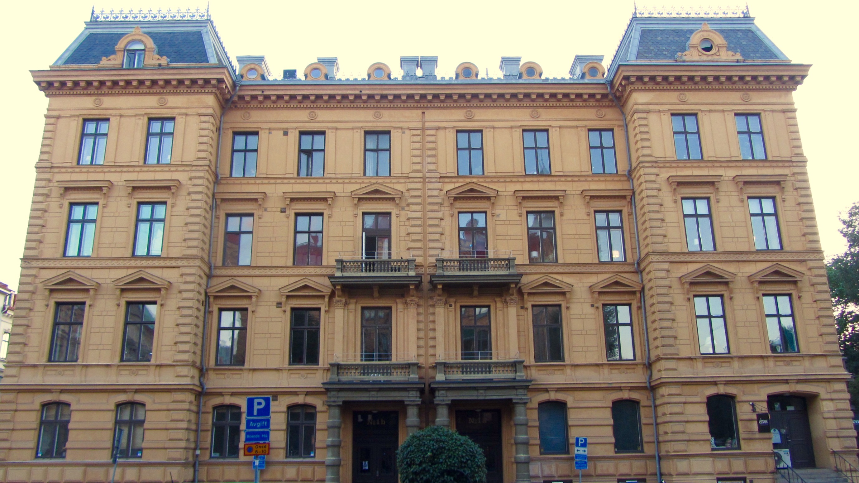 Karl Gustavsgatan 1a och 1b, Kvarteret Almen, Vasastaden, Göteborg.